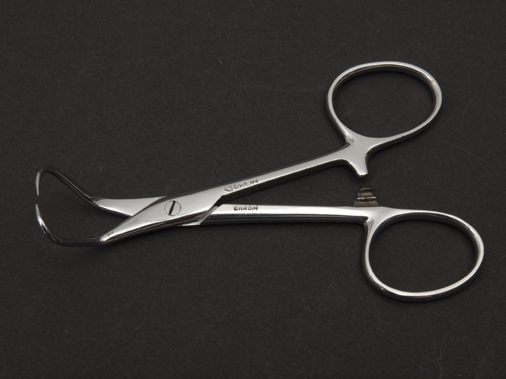 Chirurgisches Instrument der Chiron-Werke Tuttlingen